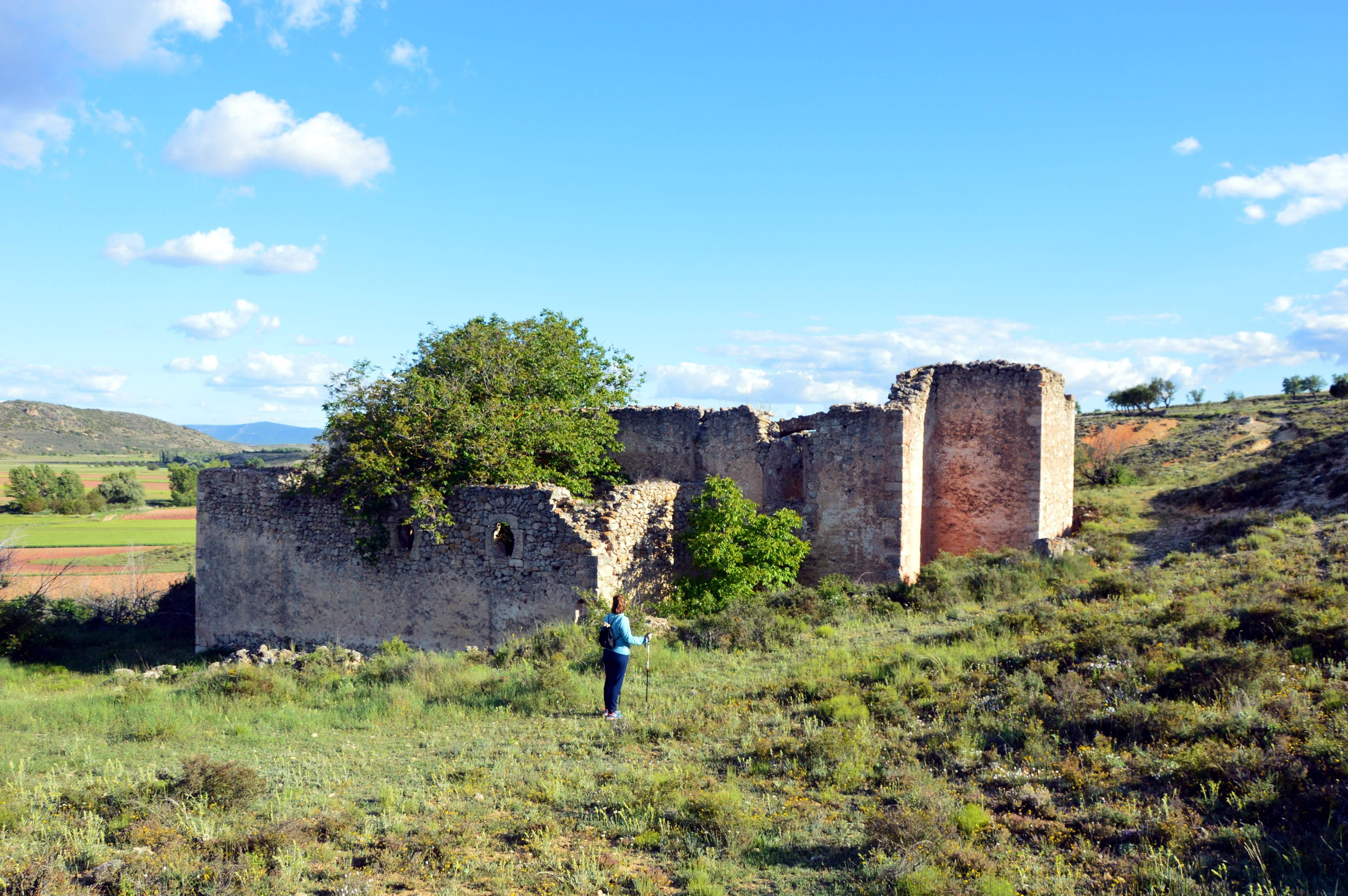 Vista general (noroccidental) de las ruinas del Convento de San Francisco (Moya, Cuenca), 2018.